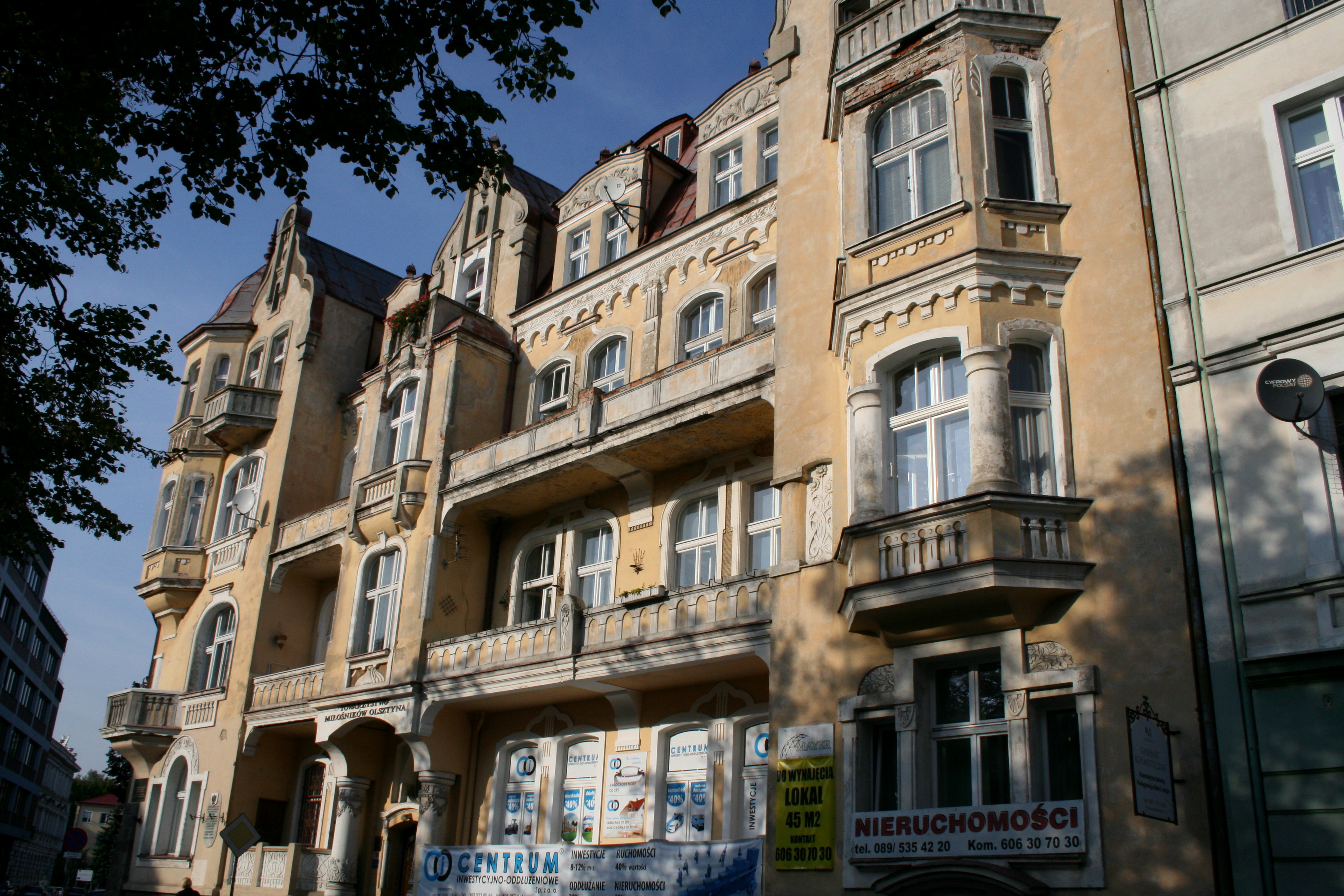 kamienica (budynek dawnego Konsulatu Polskiego) pl. Konsulatu Polskiego 5, Miasto Olsztyn